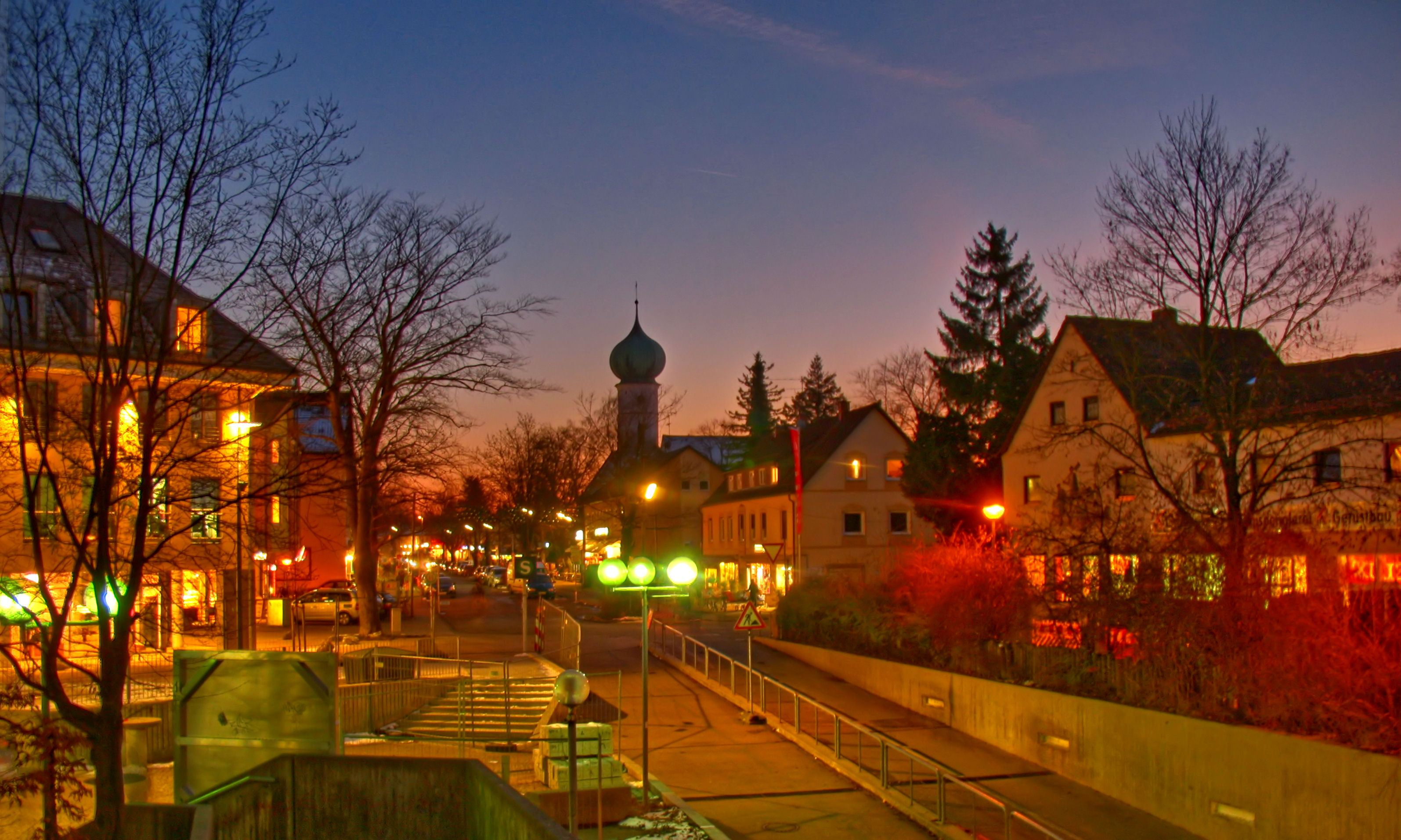 Germany, Bavaria, Groebenzell by Night